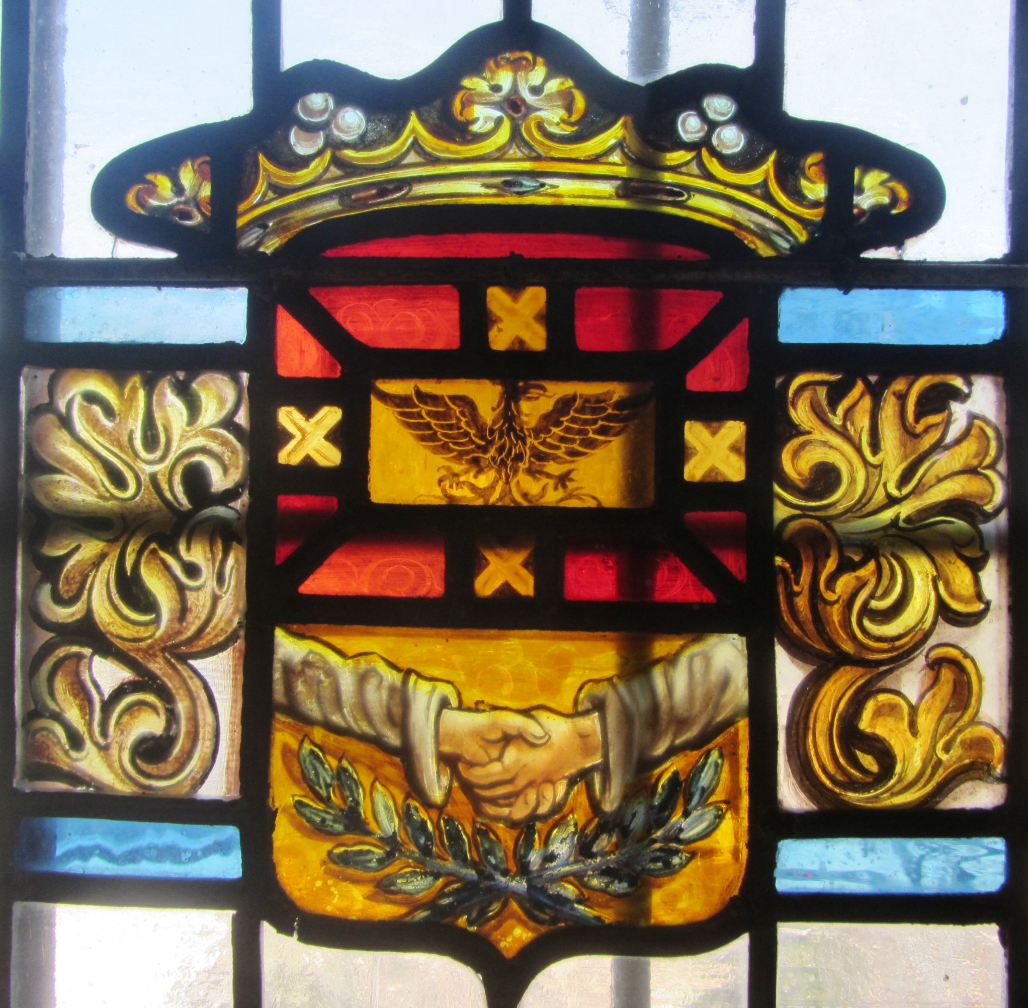 Foto tomada en la Finca 'El Vaqueril' de Brozas (Cáceres). Escudo de armas del linaje Ruano oriundo de Arjona y radicado en Cáceres. Descripción: Cortado: (1º) En campo de oro, un águila de sable. Bordura de gules, con tres aspas de oro. (2º) En campo de oro, un ramo de lauresl, surmontado de dos manos, estrechándose, al natural.